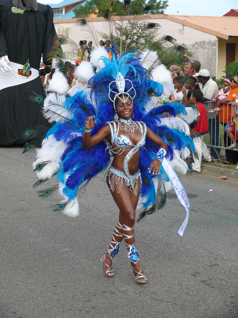 Carnaval à Kourou Danseuse en bleu